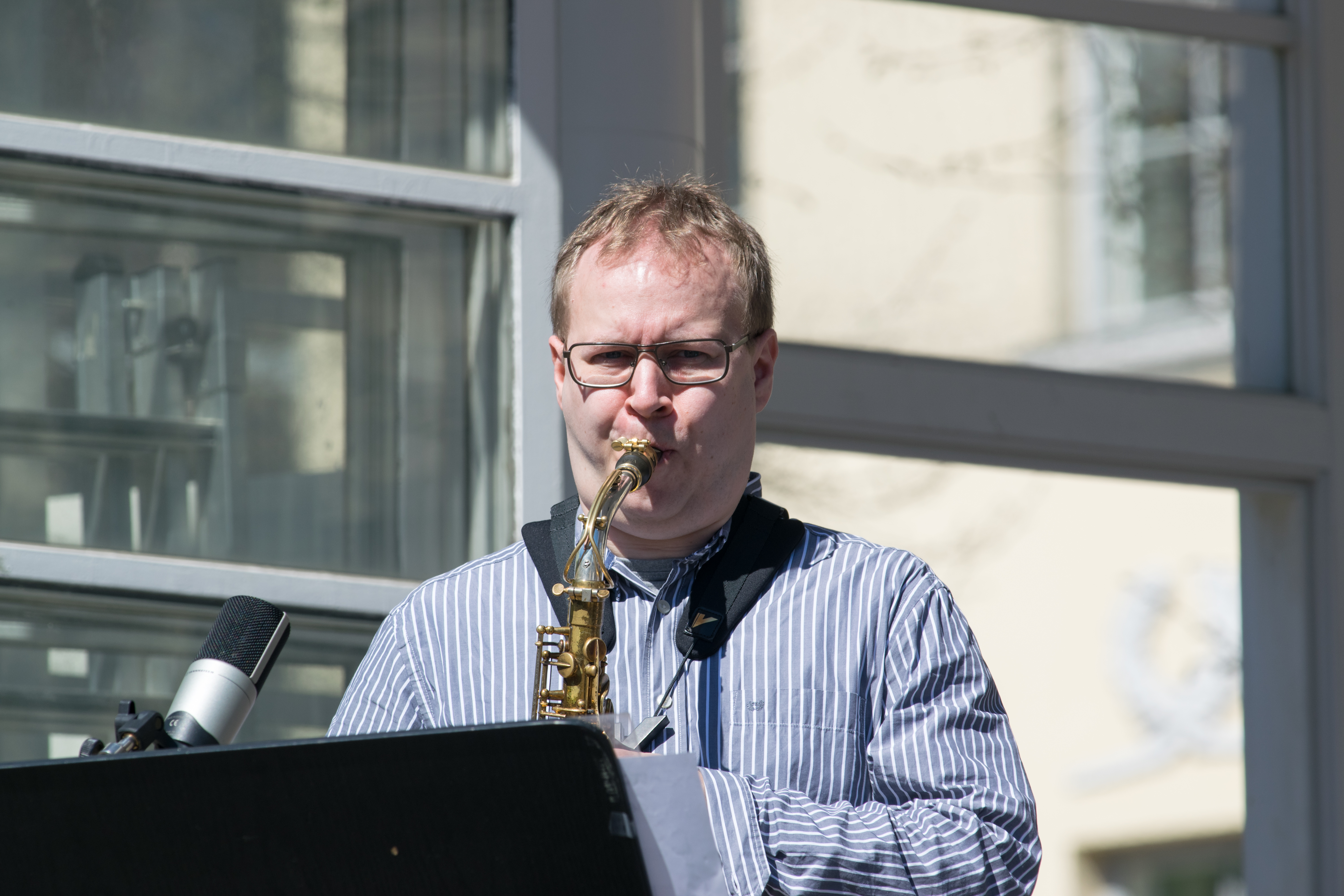 Jouni järvelä suomalainen saksofonin soittaja